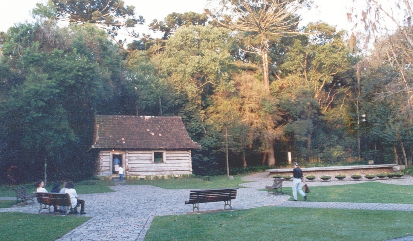 Curitiba - Bosque do Papa - Palco